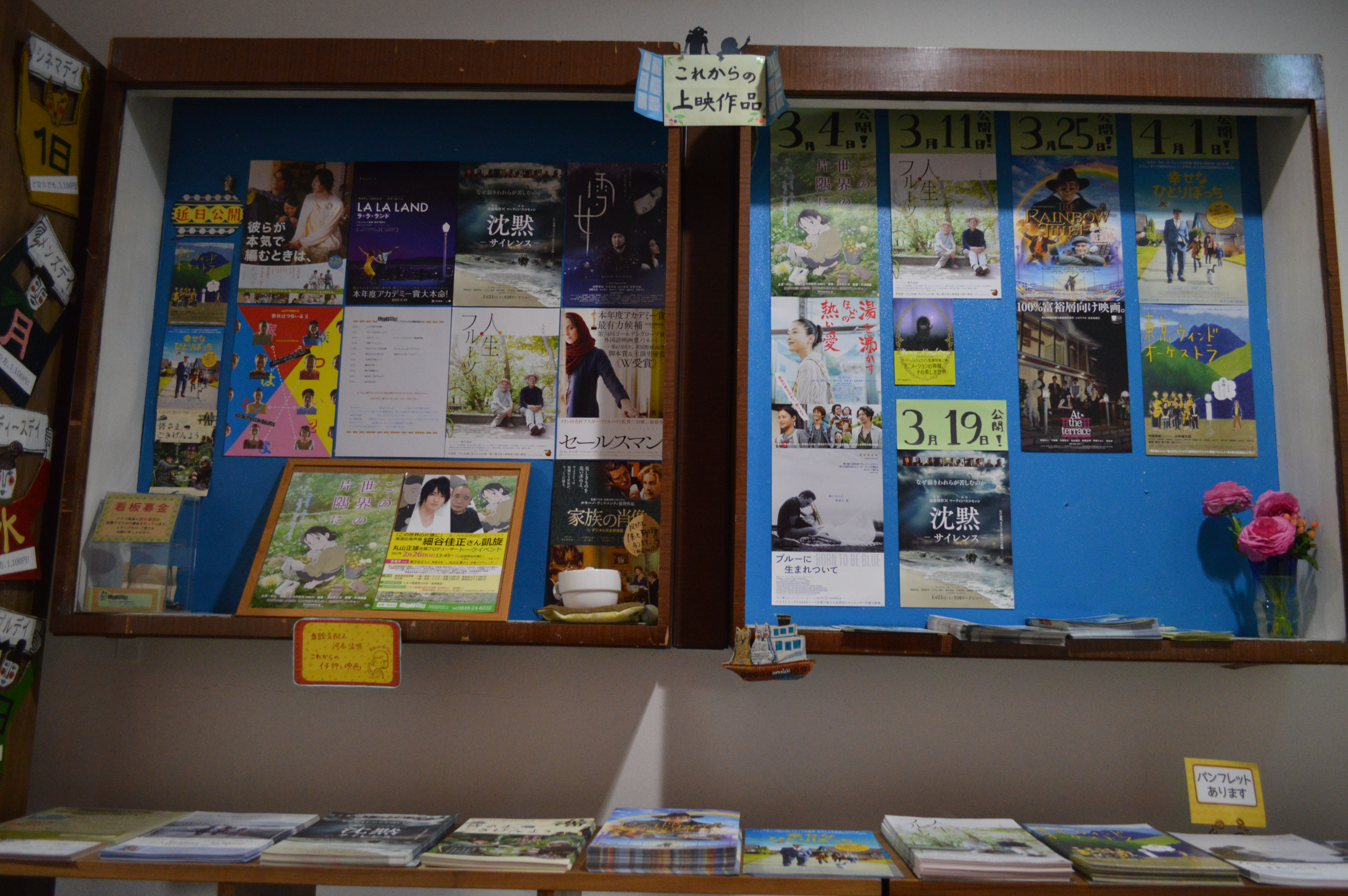 シネマ尾道。ロビー。